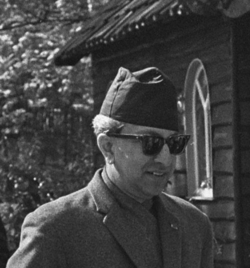 Het Nepalese koningspaar, koning Mahendra en koningin Ratna, op staatsbezoek in Nederland. Hier brengen zij samen met koningin Juliana, prins Bernhard, prinses Margriet en prinses Christina een bezoek aan de Keukenhof in Lisse